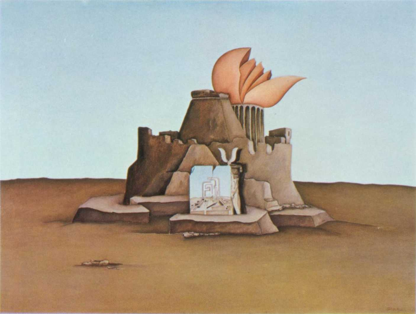 Minotaurus gegängelt von Ursula Stock, Öl auf Leinwand, 90 x 120 cm, 1978.